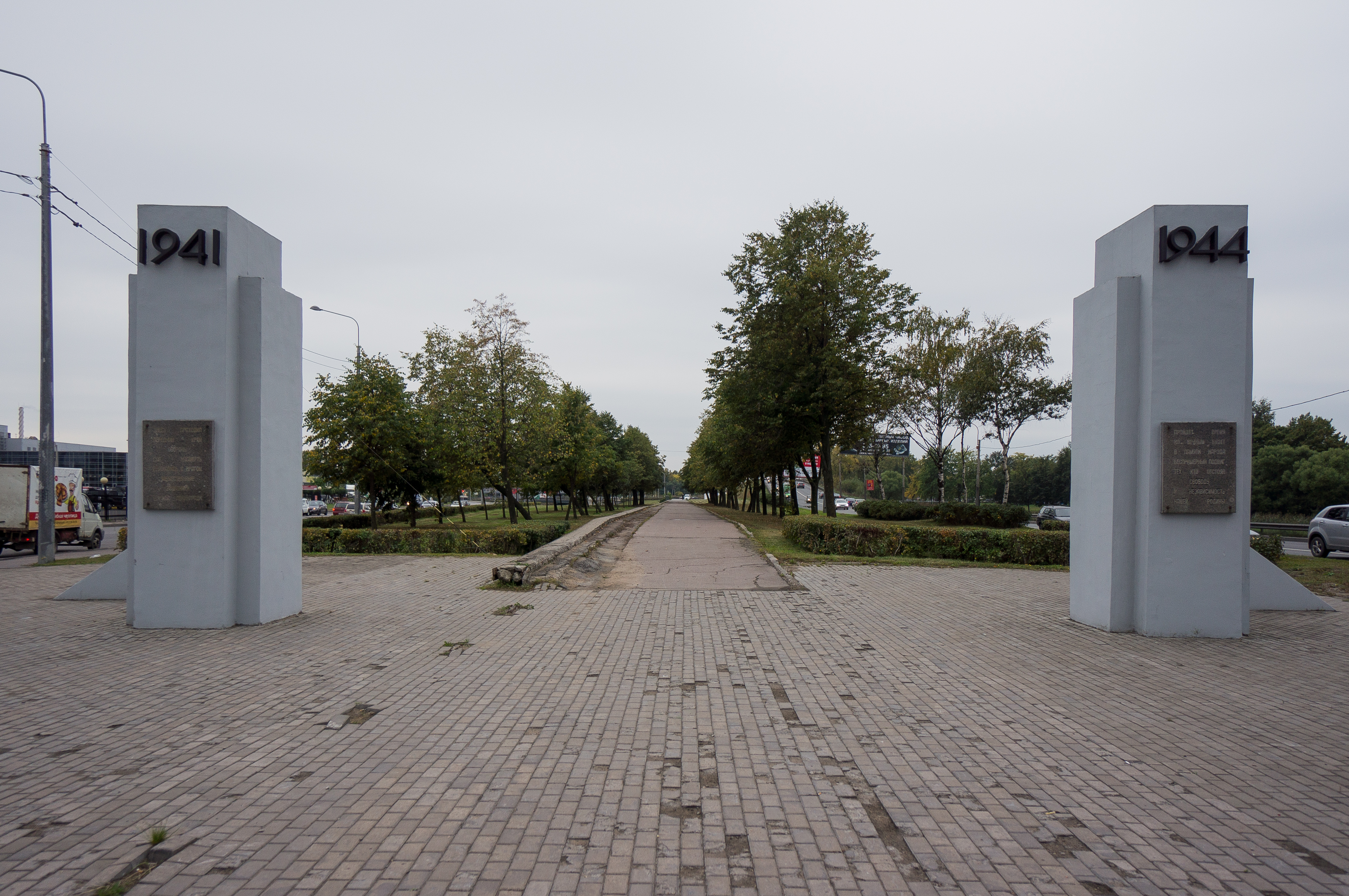 Пилоны (два): проспект Народного Ополчения, у ж/д станции Лигово, Кировский район, Санкт-Петербург